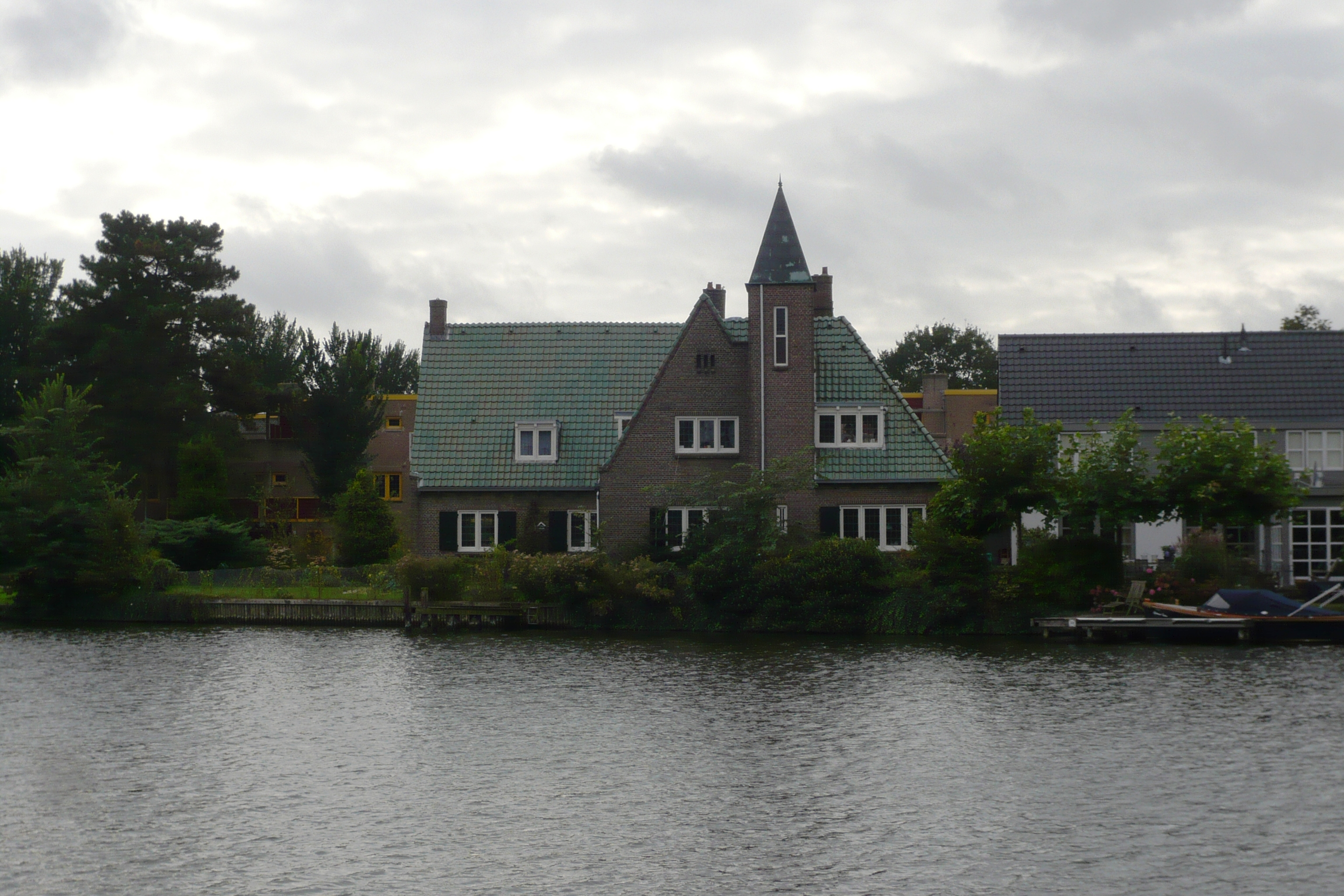 Villa "De Steenhaag", Zonnelaan, Haarlem. Gezien vanaf het Spaarne. Erachter ligt Tuinwijk, ook gebouwd naar ontwerp van de architect J.B. van Loghem.